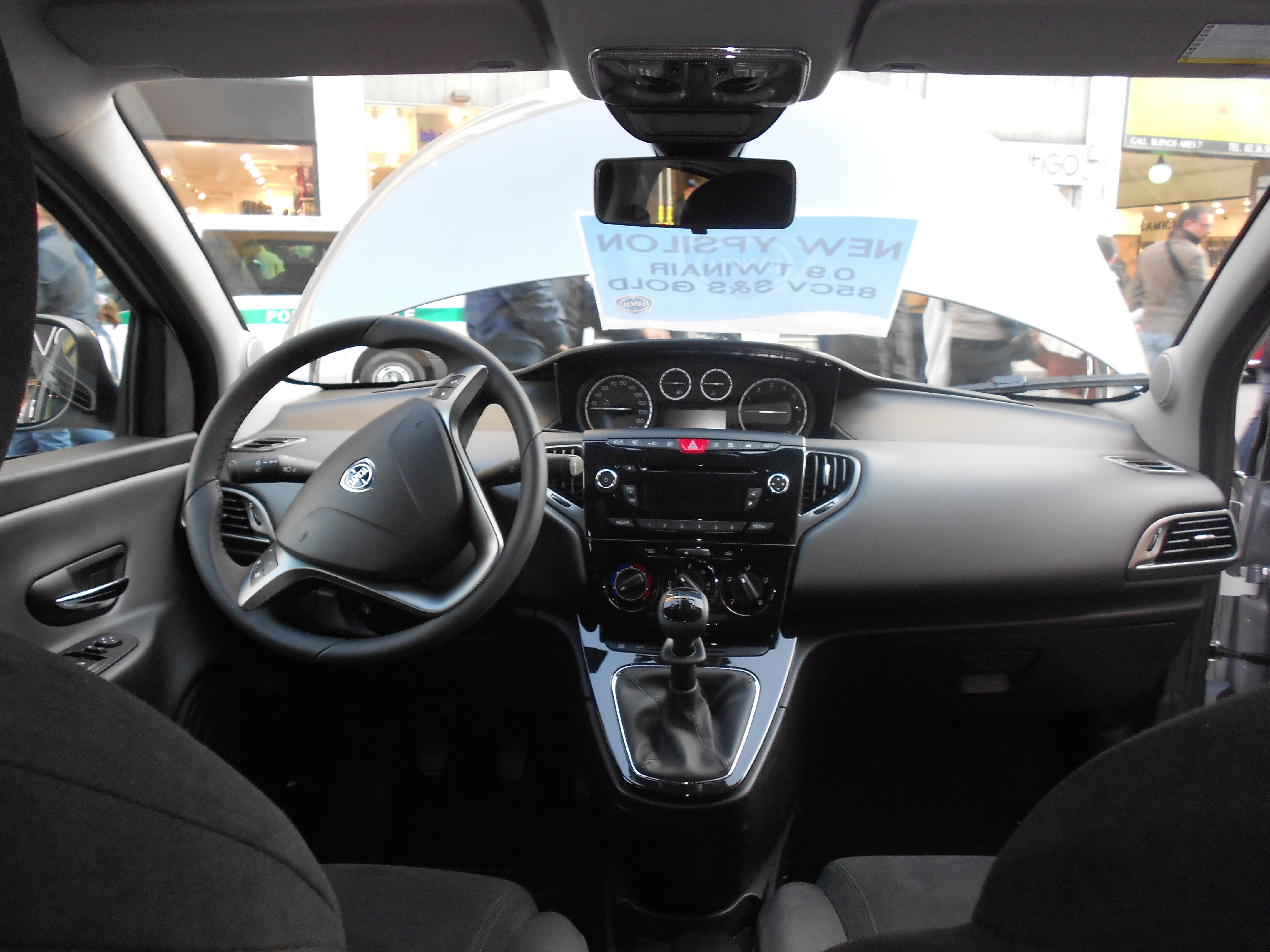 interni della nuova Lancia Ypsilon (2011) Foto scattata a Milano, Corso Buenos Aires Modello: Ypsilon (2011) Costruttore: Lancia Gruppo: Fiat Group